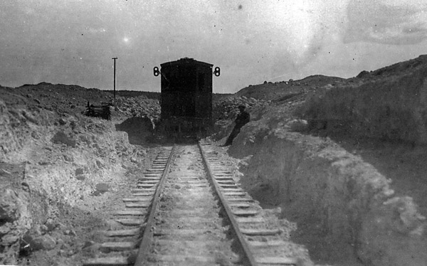 Un furgón, posiblemente sobre una porción de vía recién construida, posiblemente cerca de los yacimientos de caolín en Las Chapas.